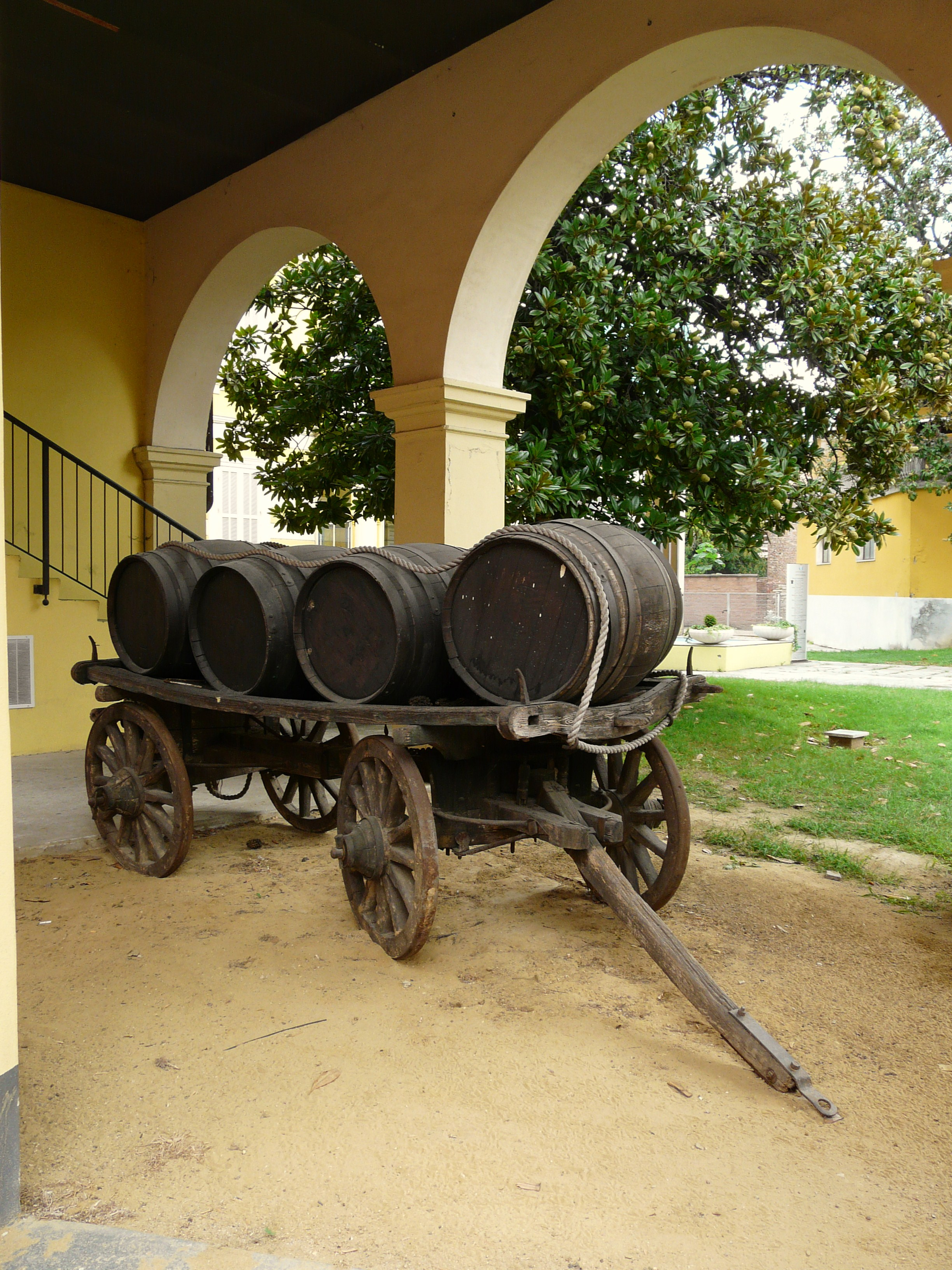 Carro merci a Canelli, Piemonte, Italia